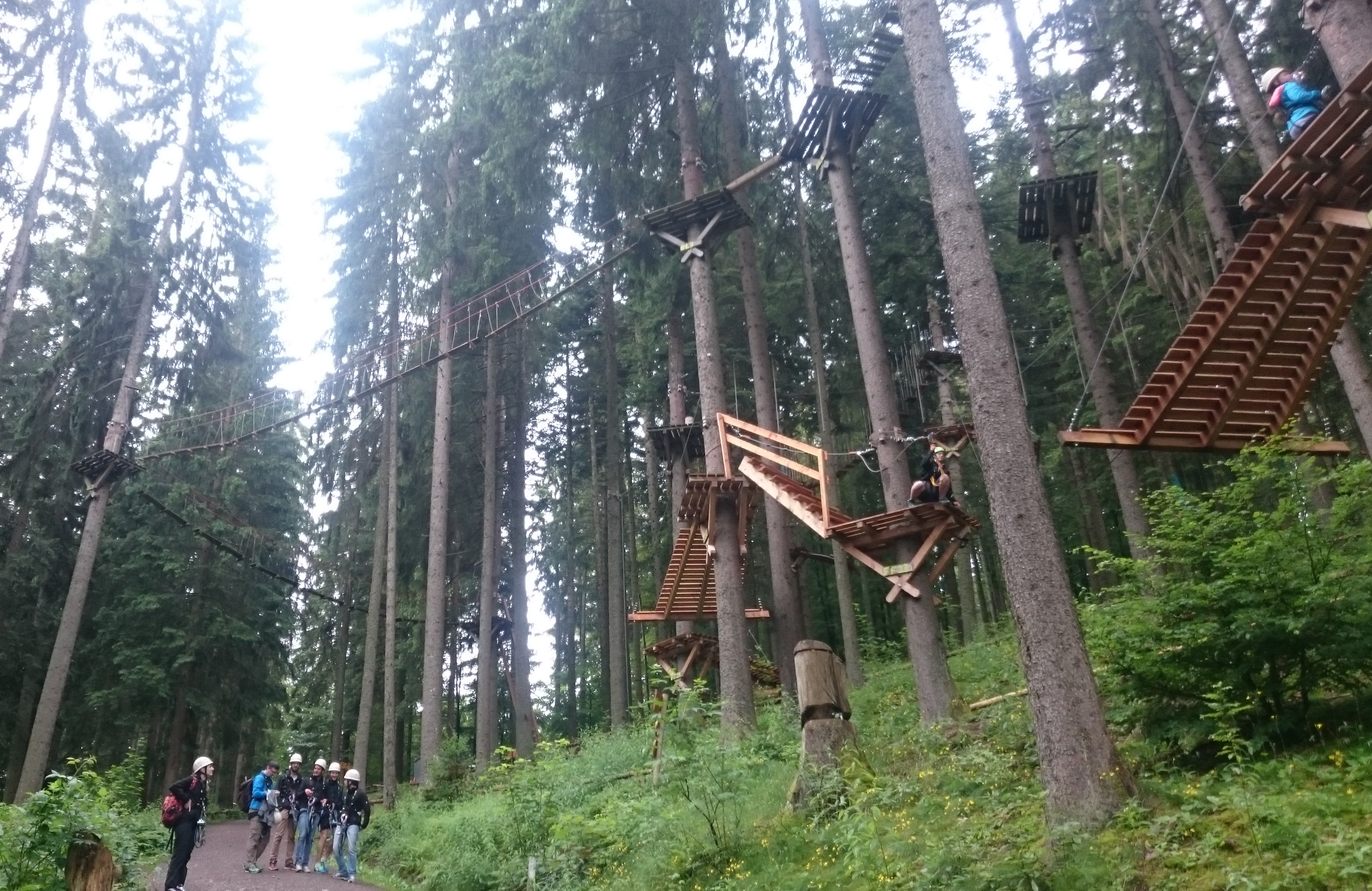 Forest Kletterwald in Titisee-Neustadt